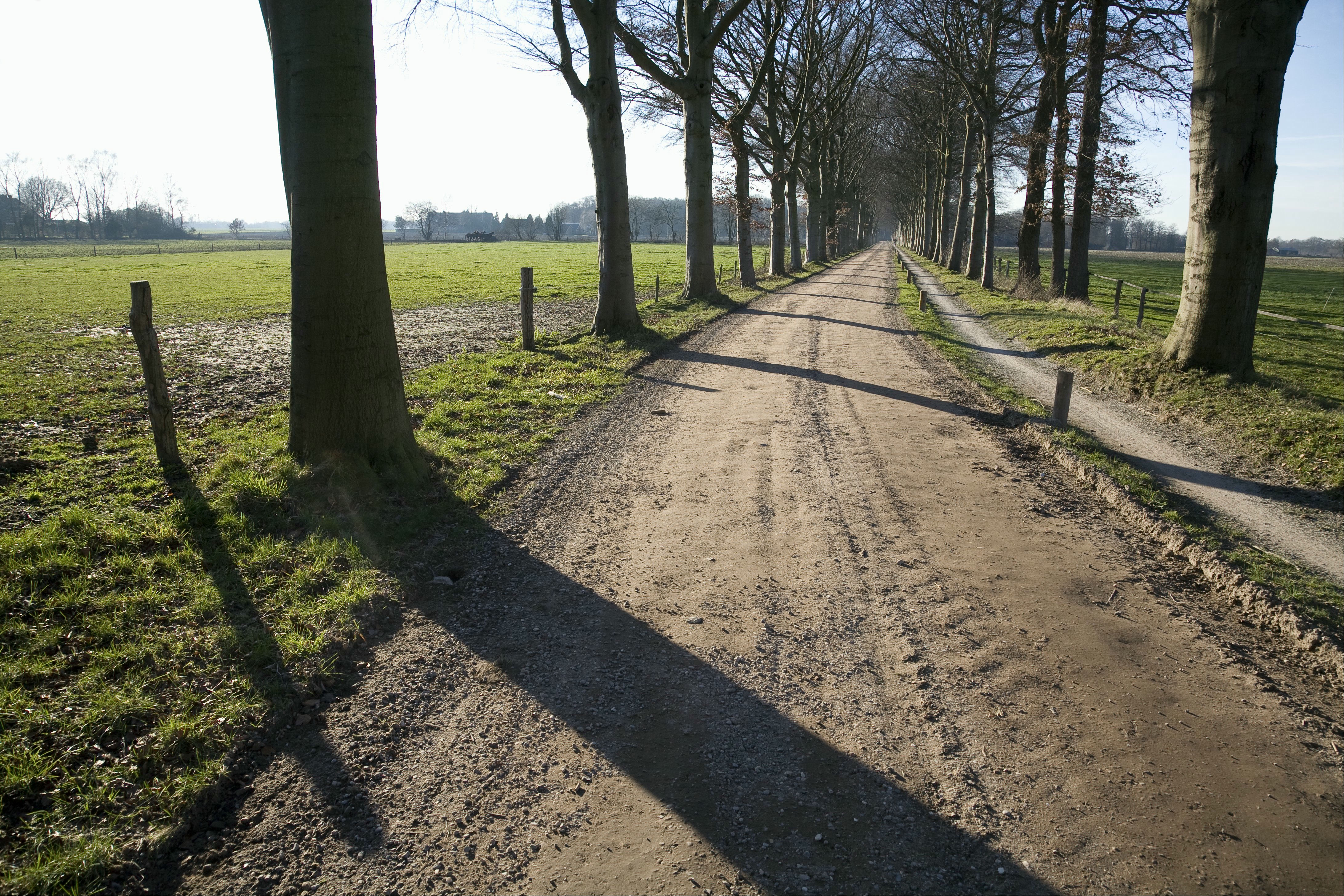 Erf Odink: Sallands dekzandlandschap. Middeleeuwse erven in de omgeving van Colmschate (opmerking: Publicatie: Mens en land in het hart van Salland (Landschapsbiografie Oost-Nederland))